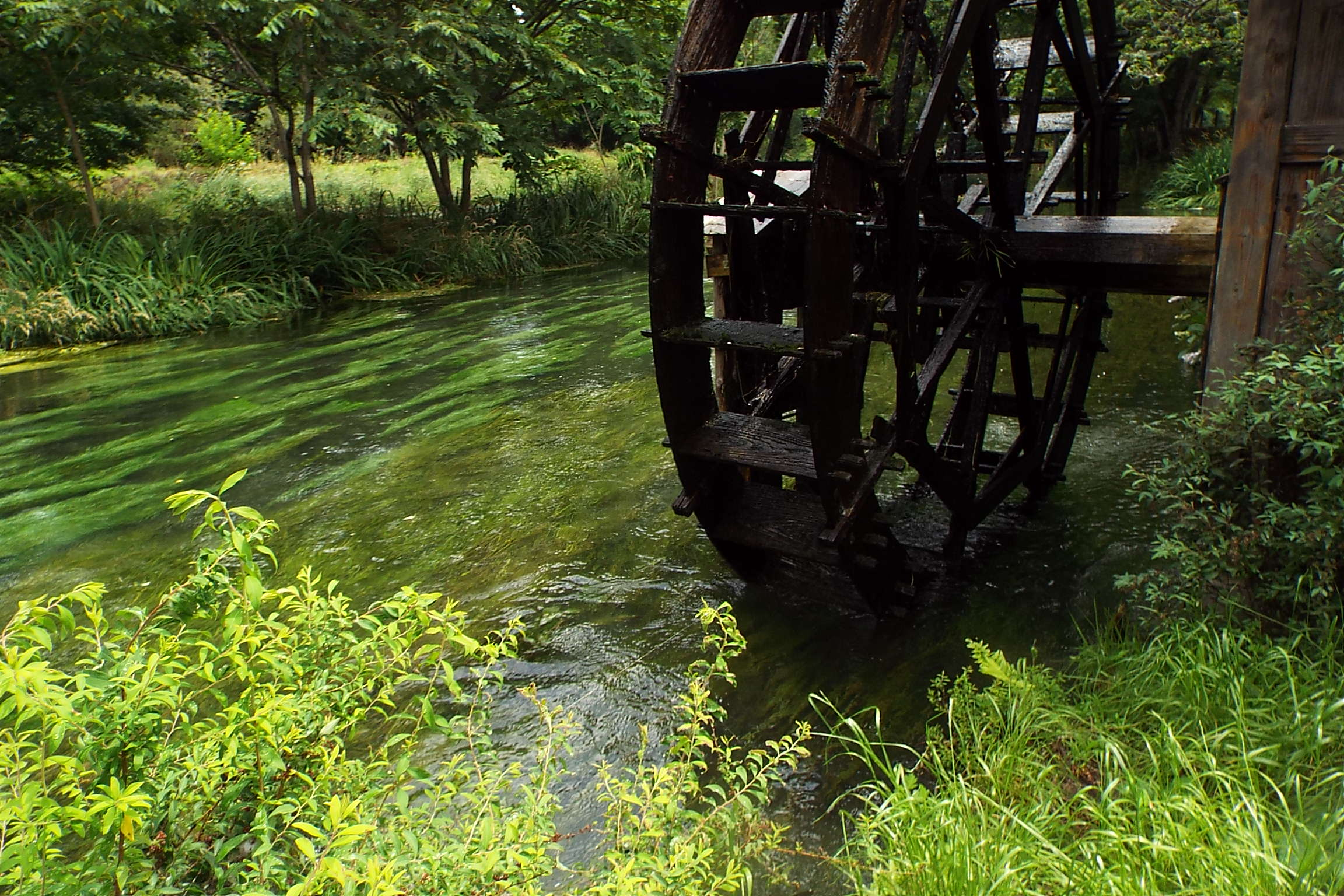 2016-07-03 Daio Wasabi Farm 大王わさび農園 蓼川と水車小屋